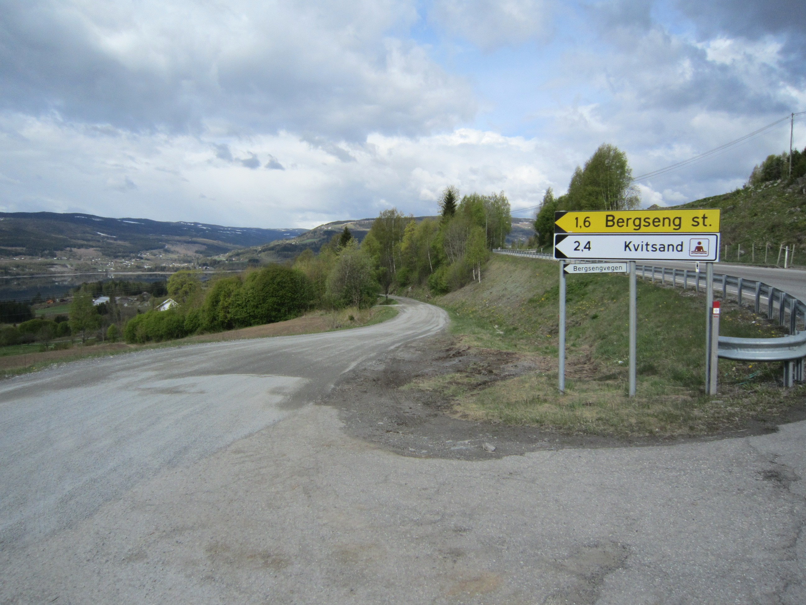 Fylkesvei 1654 (tidl. 1) tar av fra primær fylkesvei 213 et stykke over Bergseng stasjon.